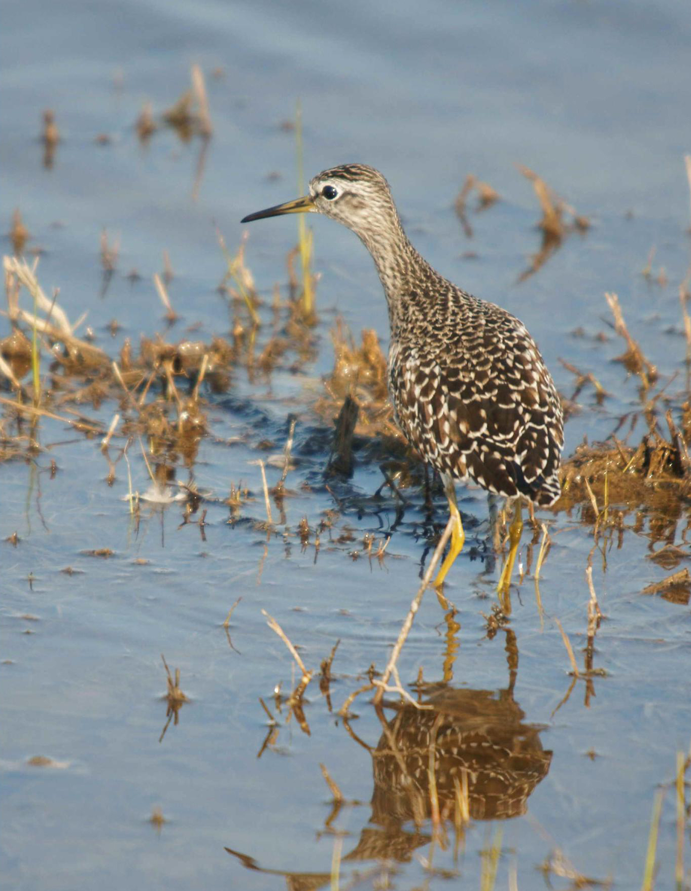 Valona - Andarrios bastardo - Wood Sandpiper - Tringa glareola, Llobregat Delta, Barcelona, Spain